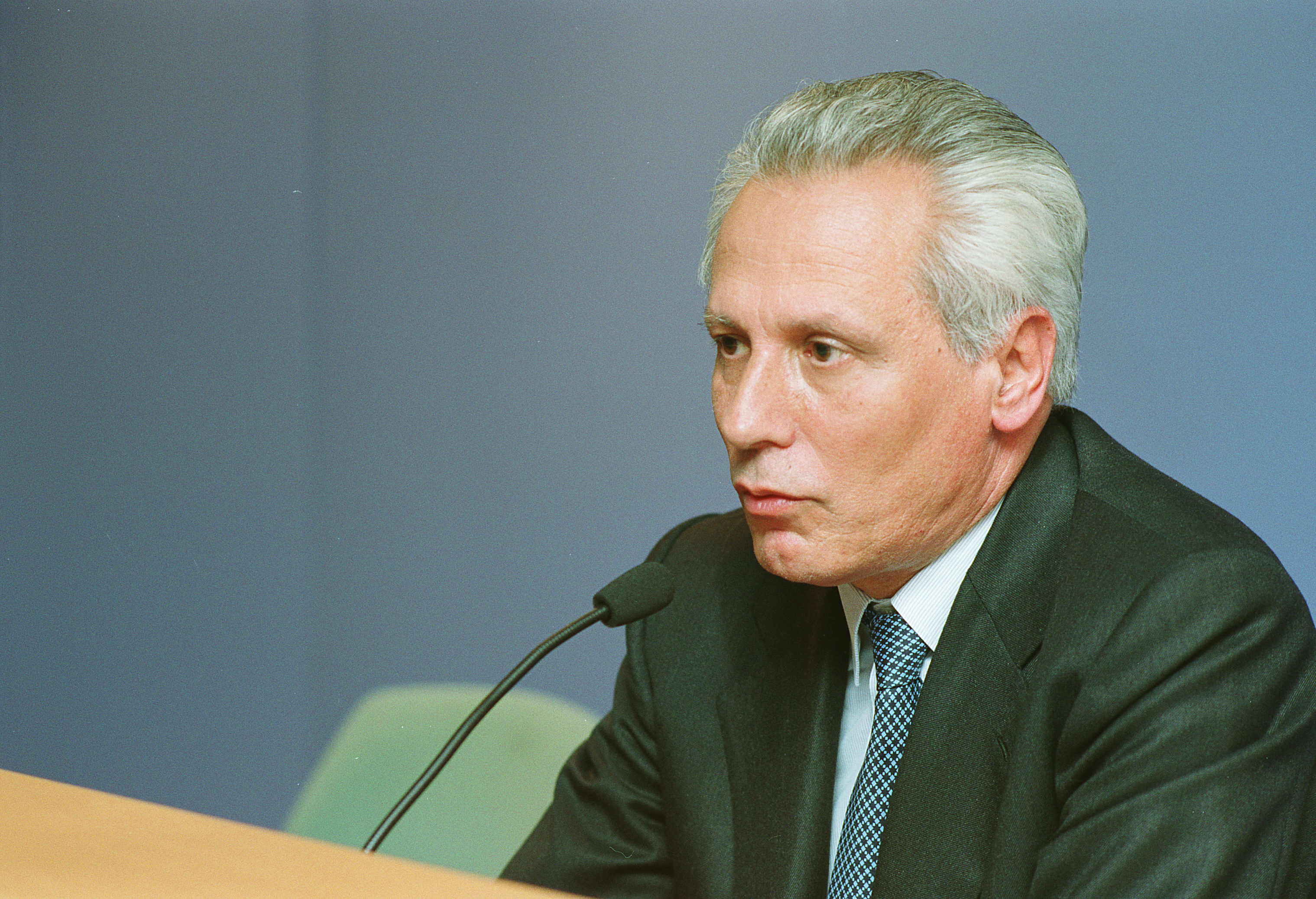 Isidre Molas al MHC el 2001.